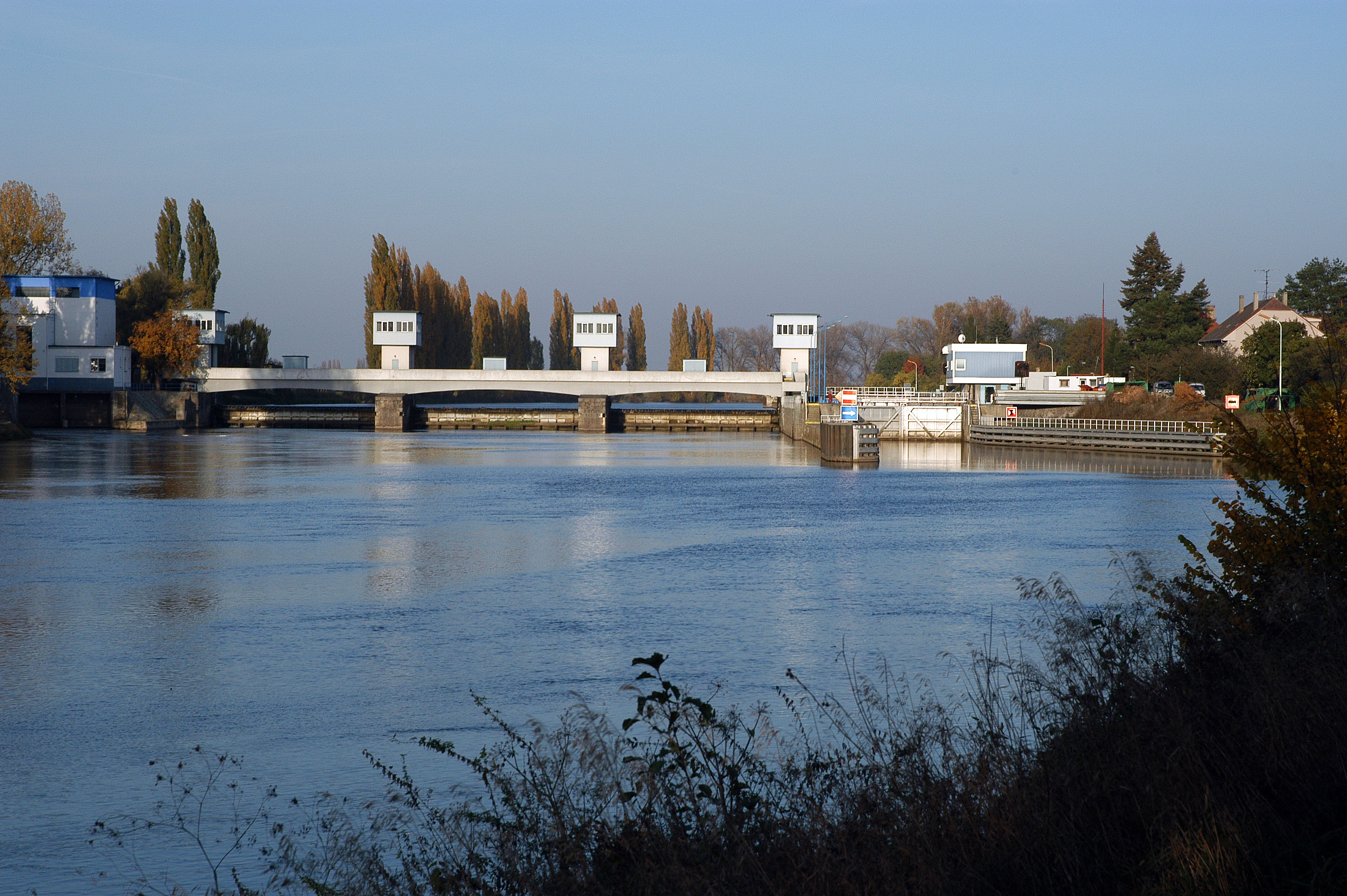 Plavebni komora na Labi mezi Lysou nad Labem a Přerovem nad Labem.